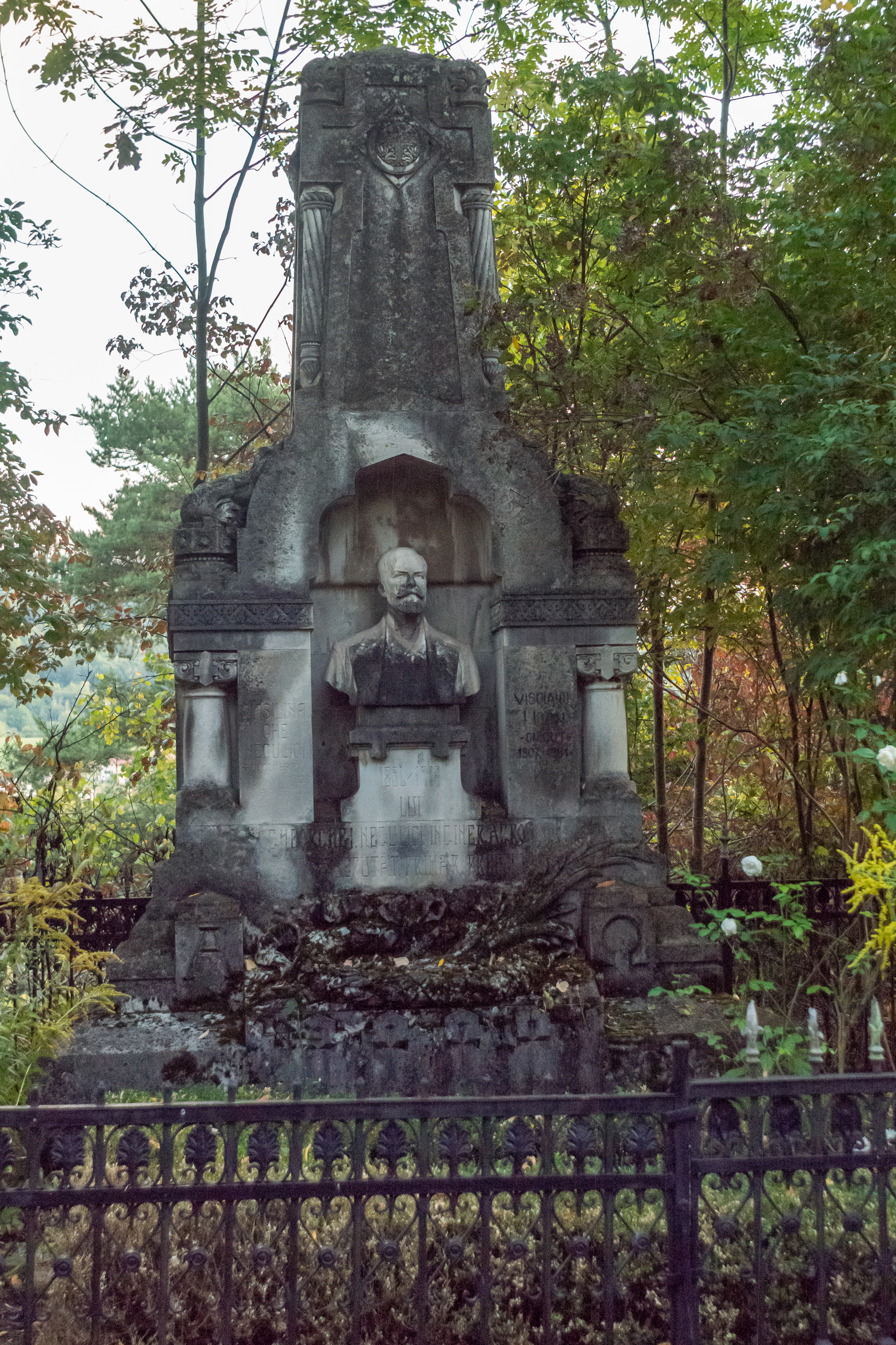 Monumentul funerar al prefectului Gr. Negulici, Câmpulung.